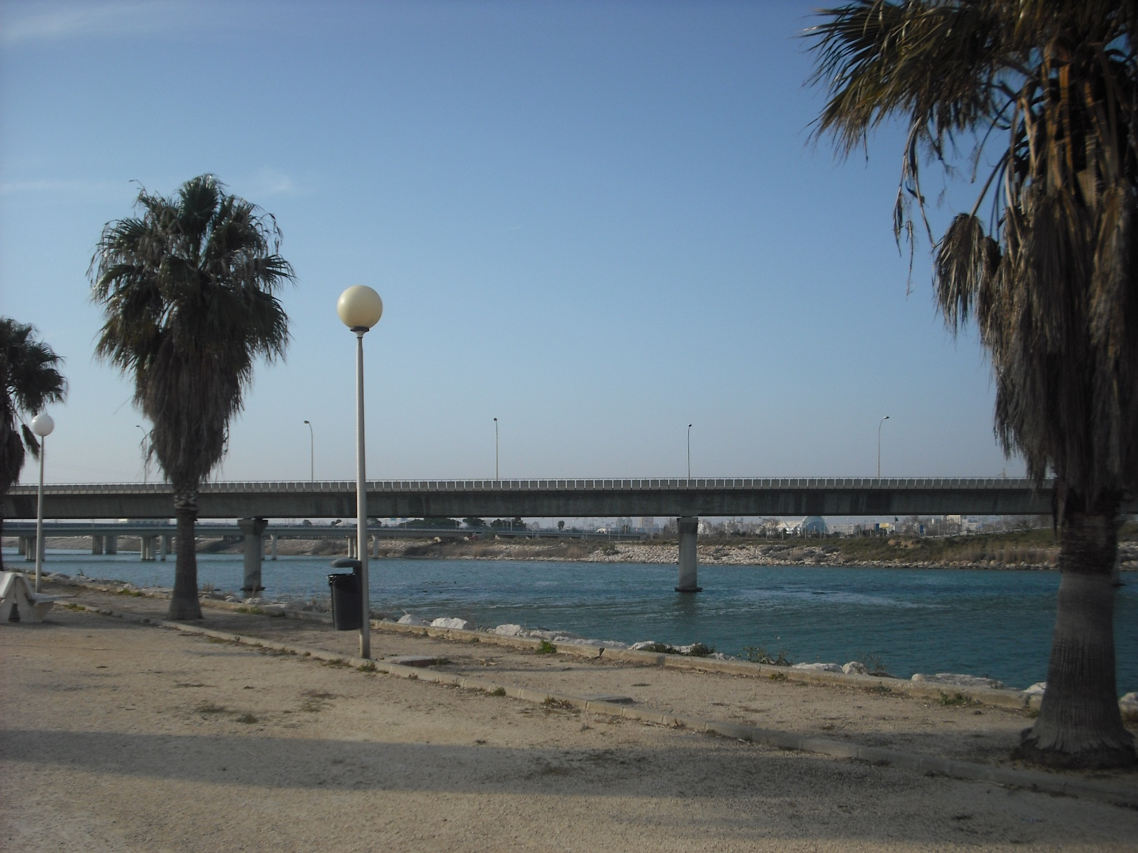 Desembocadura del nou llit del riu Túria.